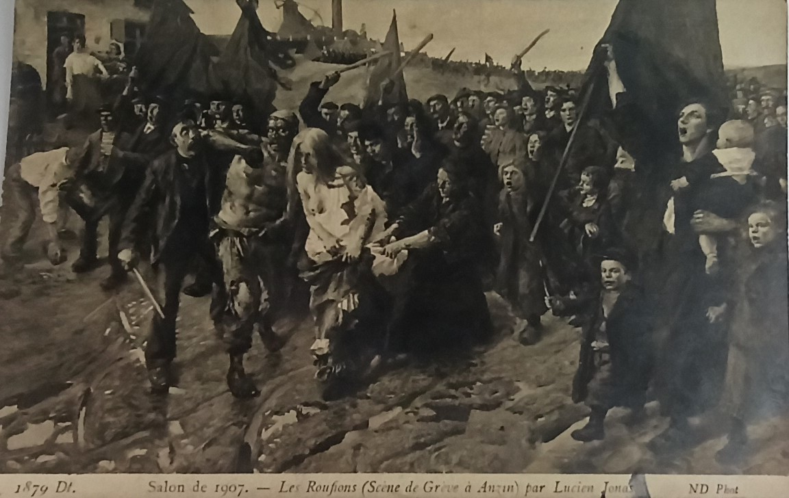 carte postale de 1907- Les Roufions (Scéne de gréve) à Anzin